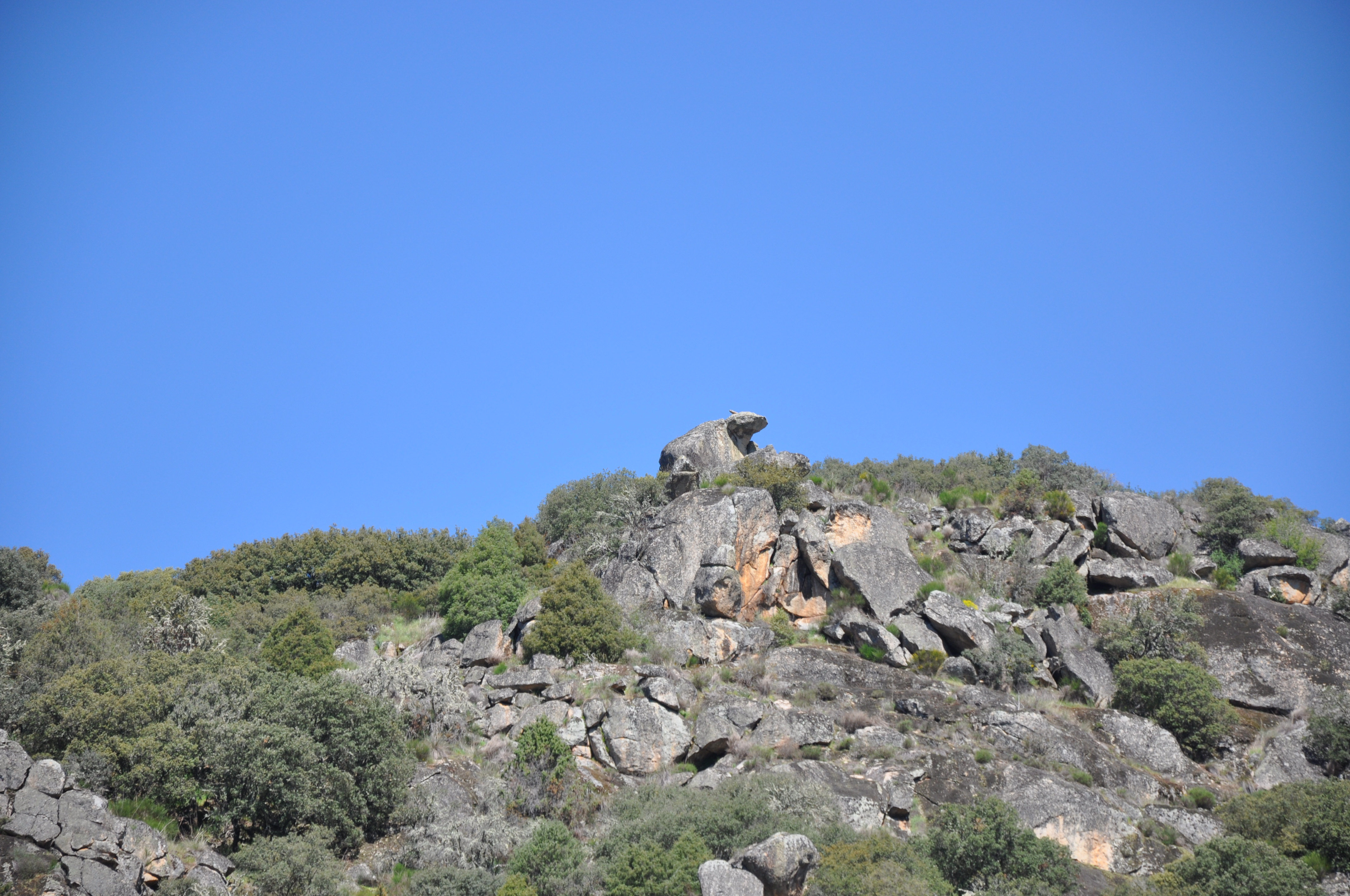 El Oso en lo alto del castro, visto desde el barco que hace la ruta turística por el cañón del Duero desde Miranda do Douro. Portugal.